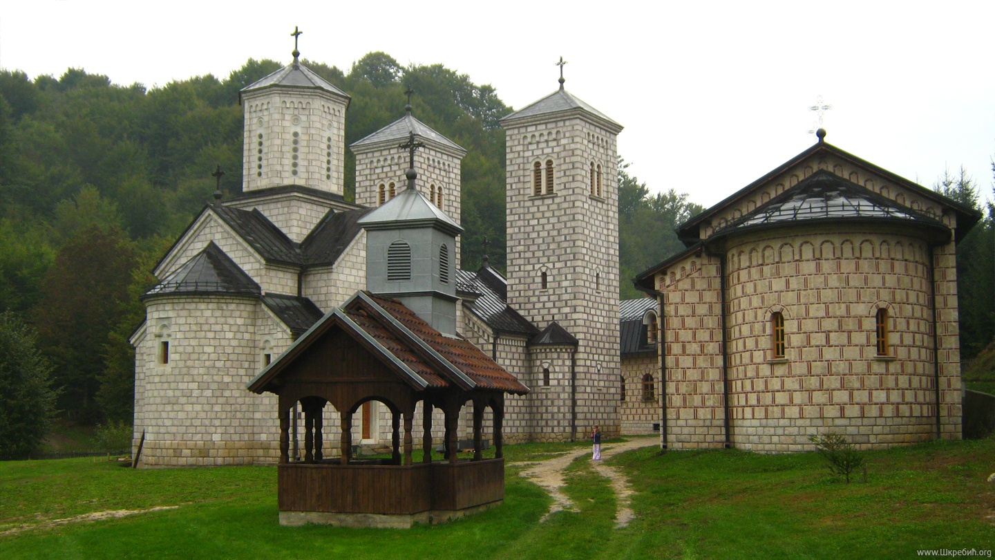 Манастир ступље. Властита фотографија.